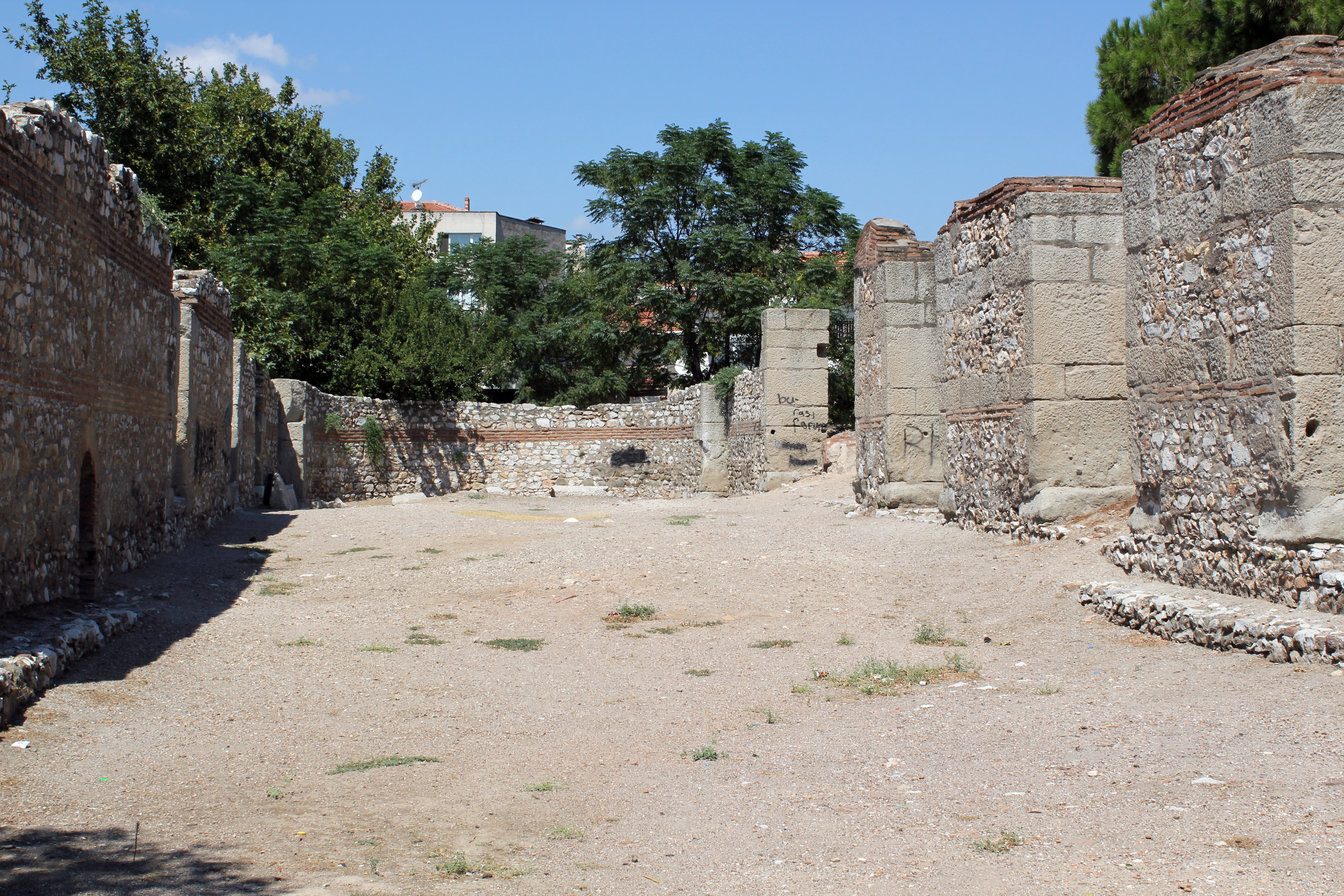 Ruinen einer Basilika in Thyatira, Akhisar, Westtürkei